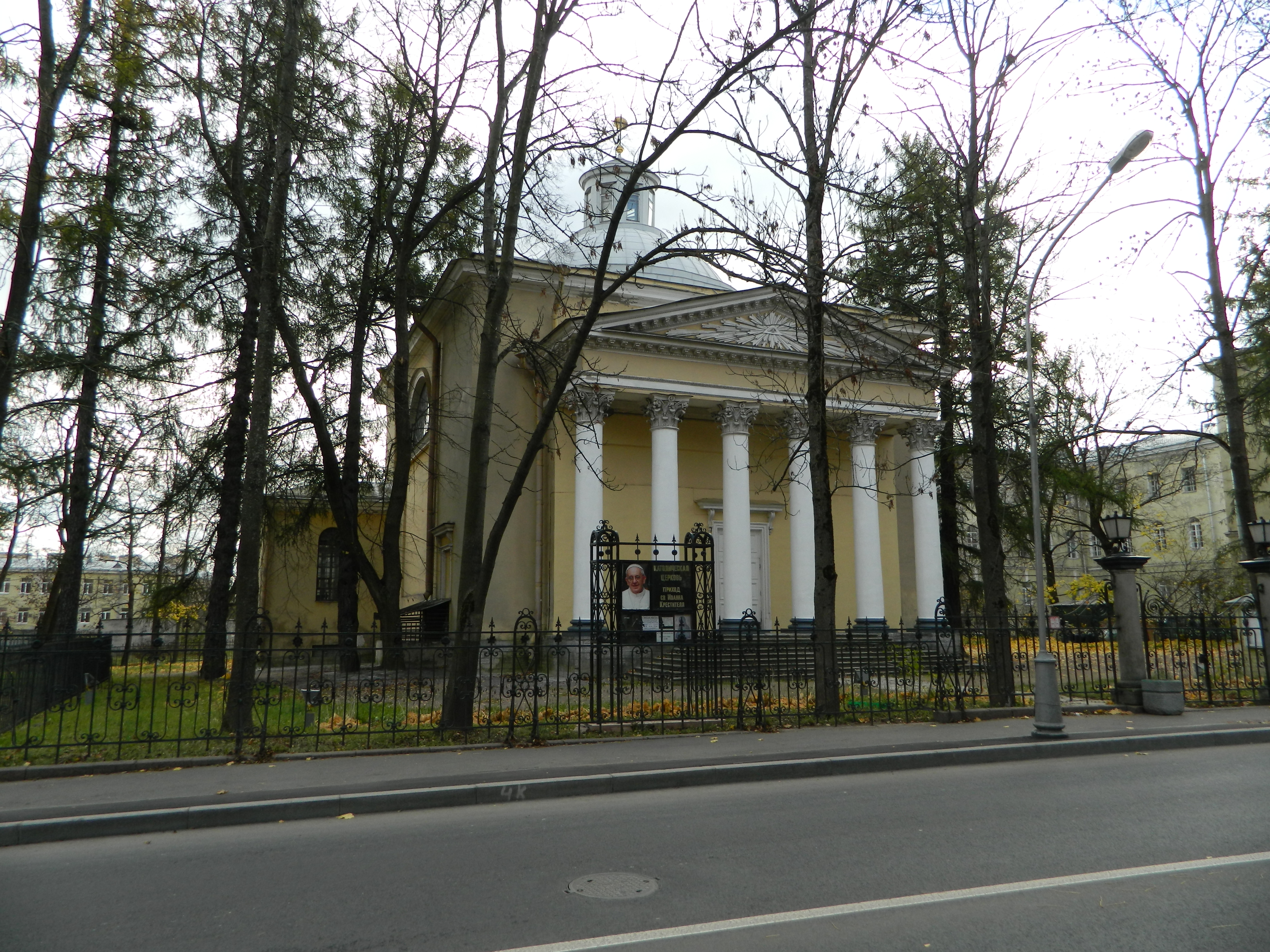 Храм римско-католический Святого Иоанна (Санкт-Петербург и Лен.область, Пушкин, Дворцовая улица, 15)